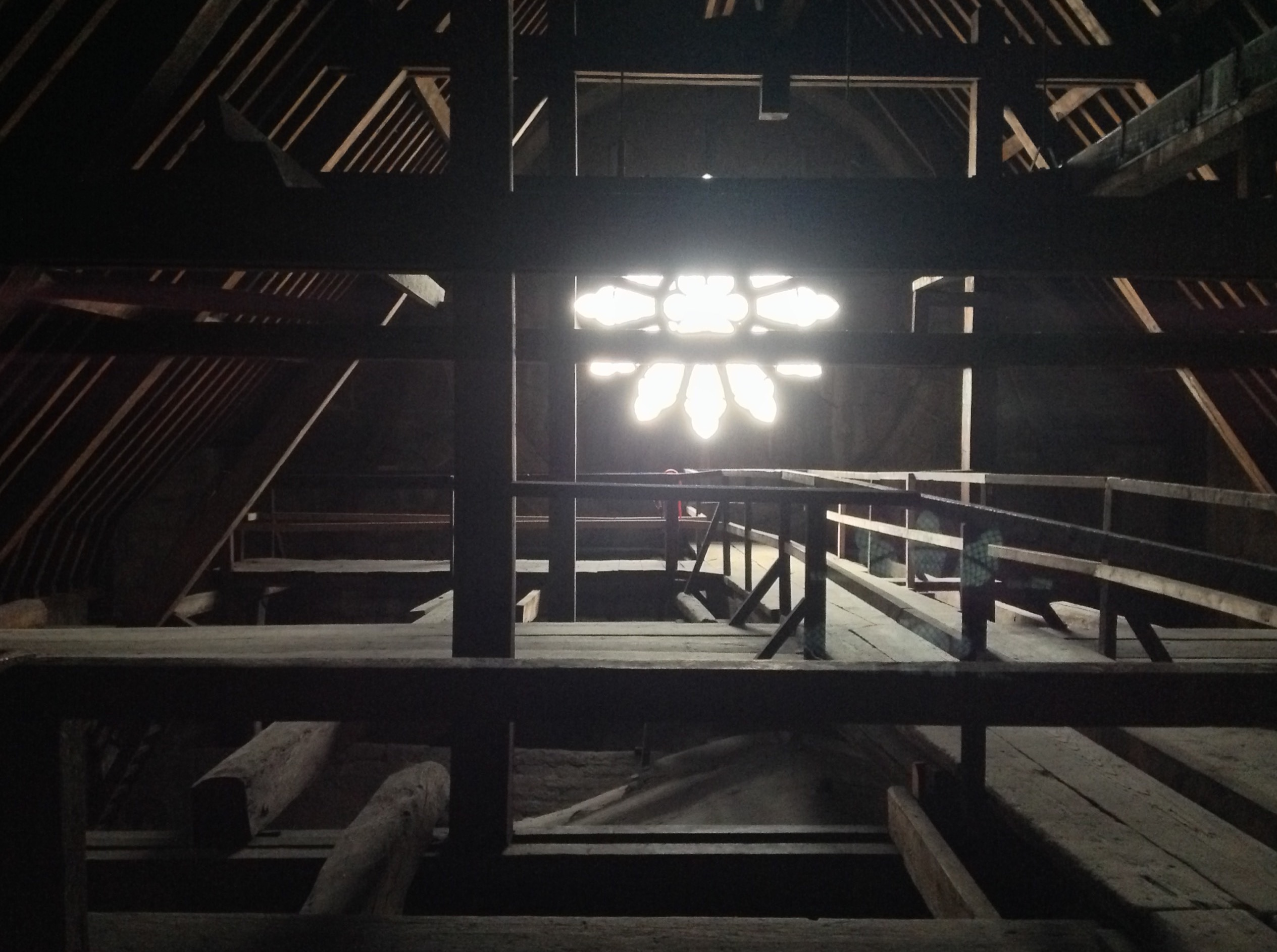 Charpentes en bois de la cathédrale Notre-Dame de Paris